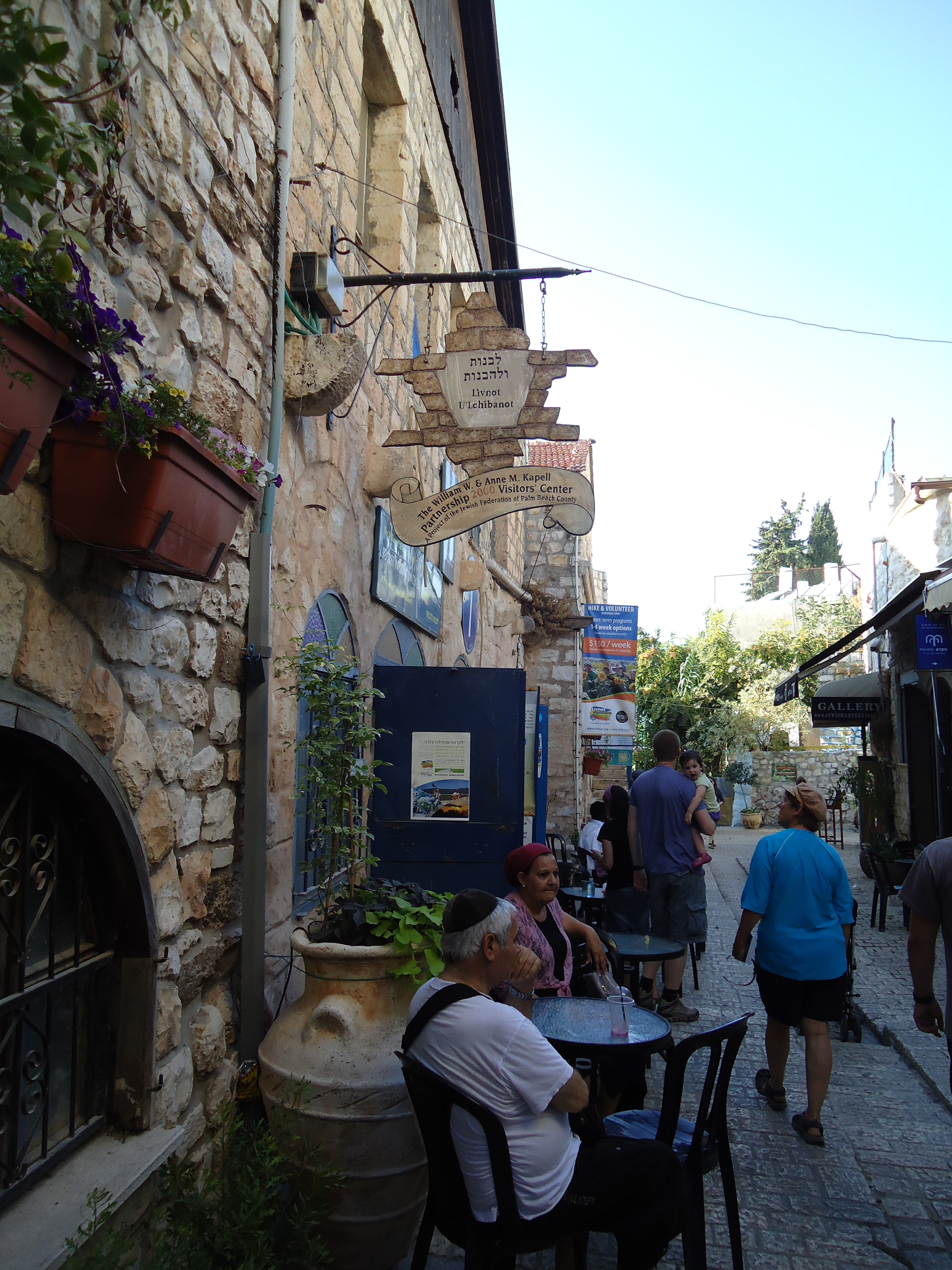 DSC09044 Israel